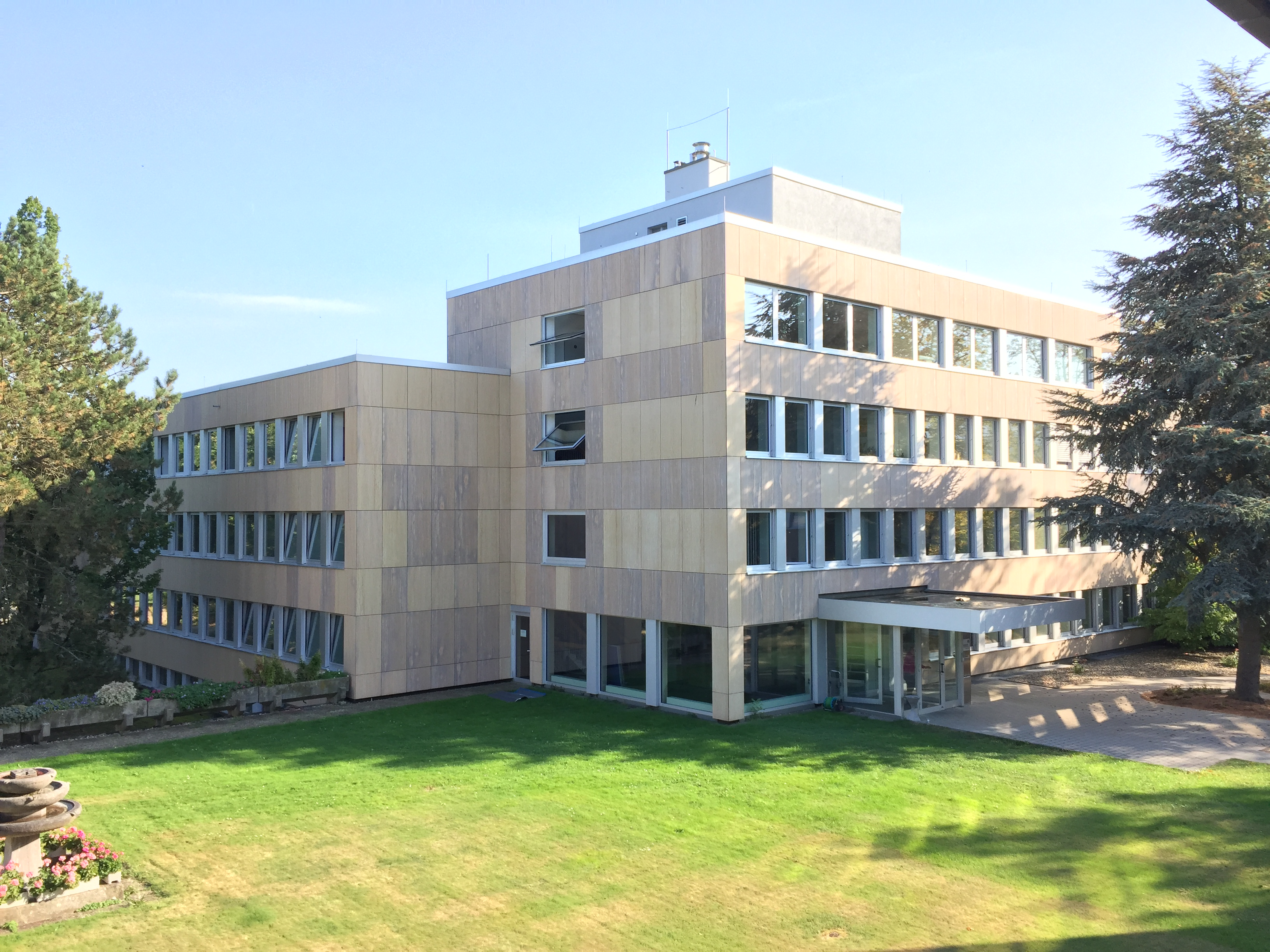 Gebäude Hauptverwaltung SVLFG Kassel